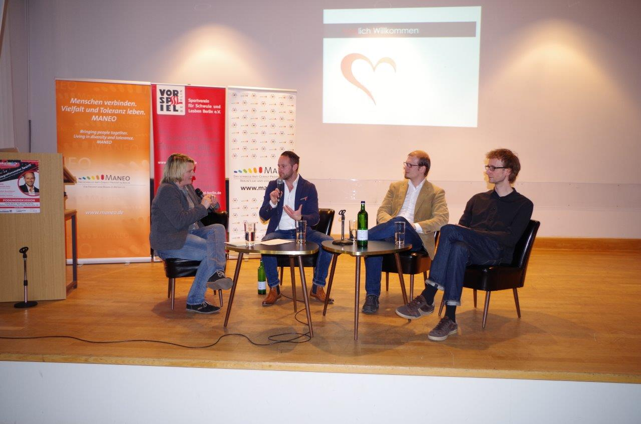 Podiumsdiskussion zum Thema "Homo- und Transphobie im Sport" im Rahmen des Projektes "Setz ein Zeichen" 2016